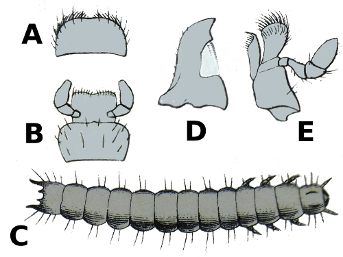 Zeichnungen zu Bitoma crenata Aus Reitter, Fauna Germanica III.Bad Stuttgart 1911, Tafel 96 (dort Ditoma crenata, , verschiedene Ausschnitte neu zusammengestellt, eingefärbt, umbenannt. A Oberlippe B Unterlippe mit Lippentastern C Larve D Oberkiefer E Unterkiefer mit Kiefertaster